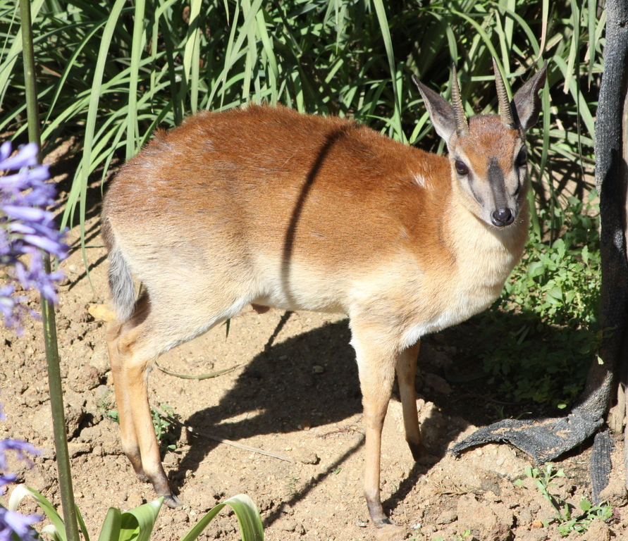 Cephalophus natalensis, Red duiker